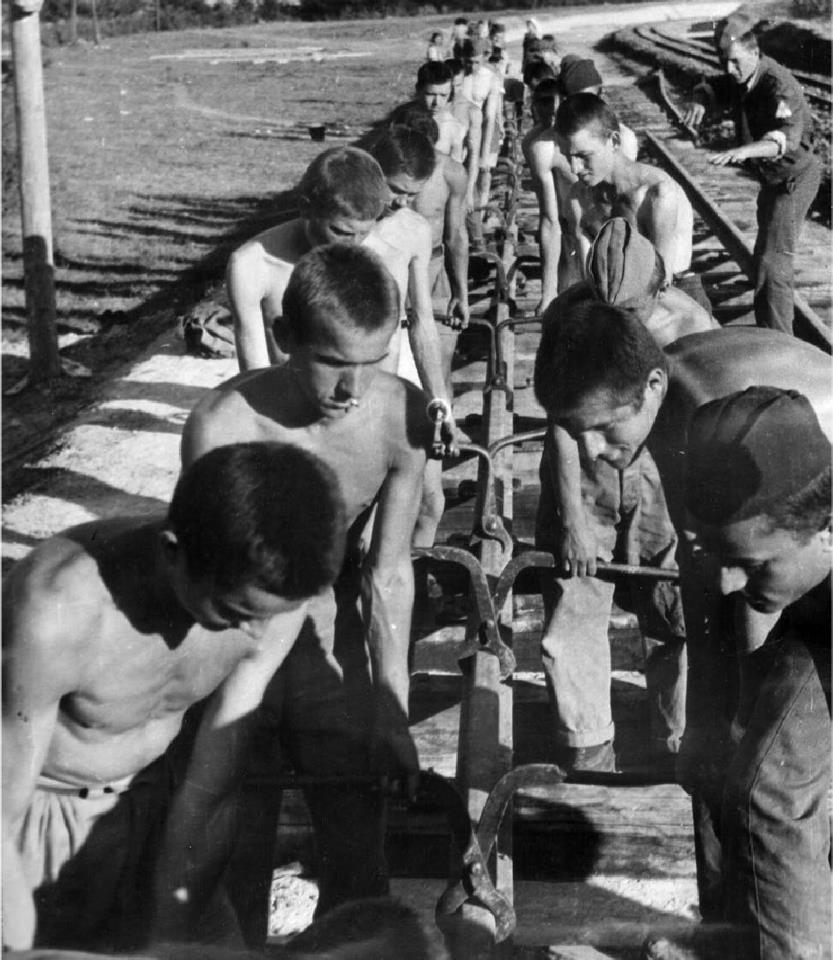 Graditelji pruge na dionici kod Zenice, između Donje Vrace i Pečuja. Vidi se još kolosjek uskotračne pruge.